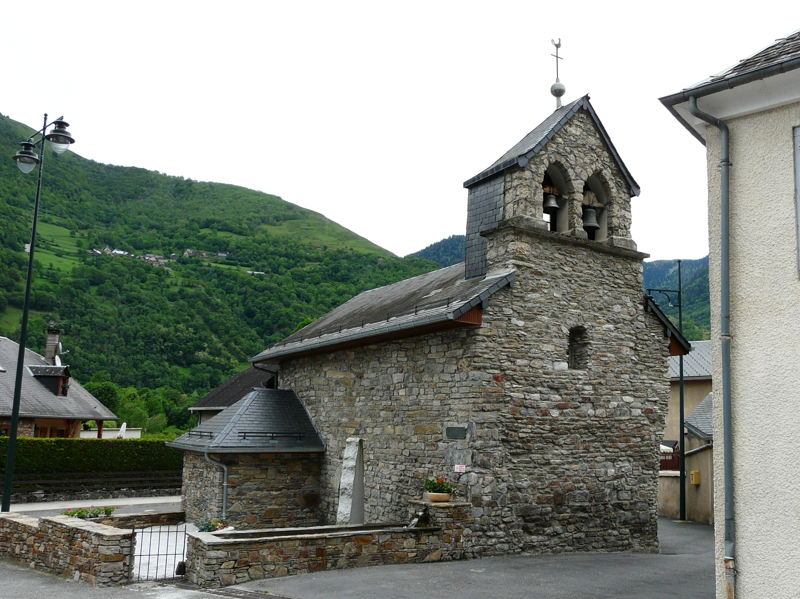 La minuscule église de Moustajon, Haute-Garonne, France.